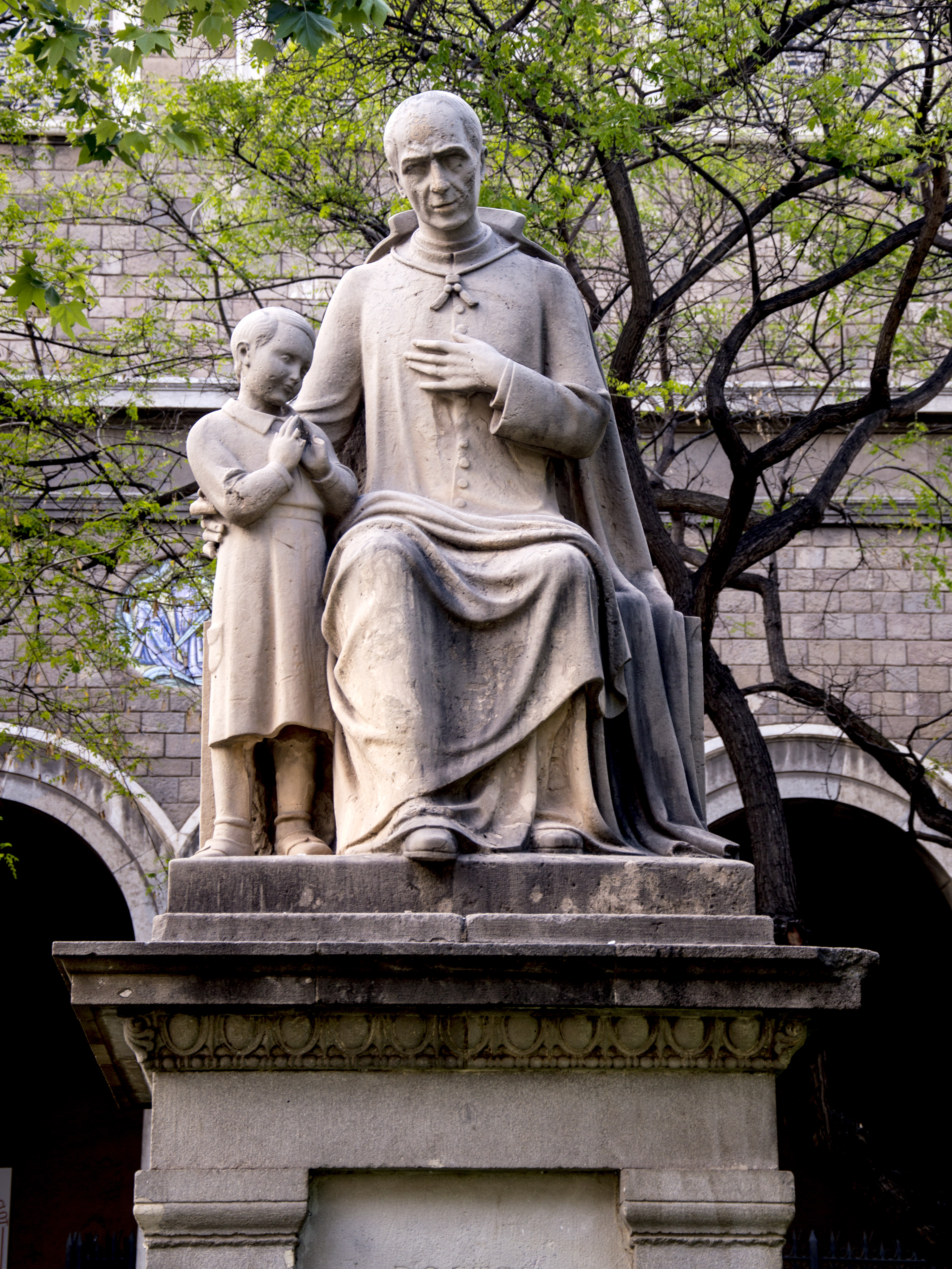 Al canonge Rodó (Frederic Marès). Pl. Canonge Rodó (Barcelona)